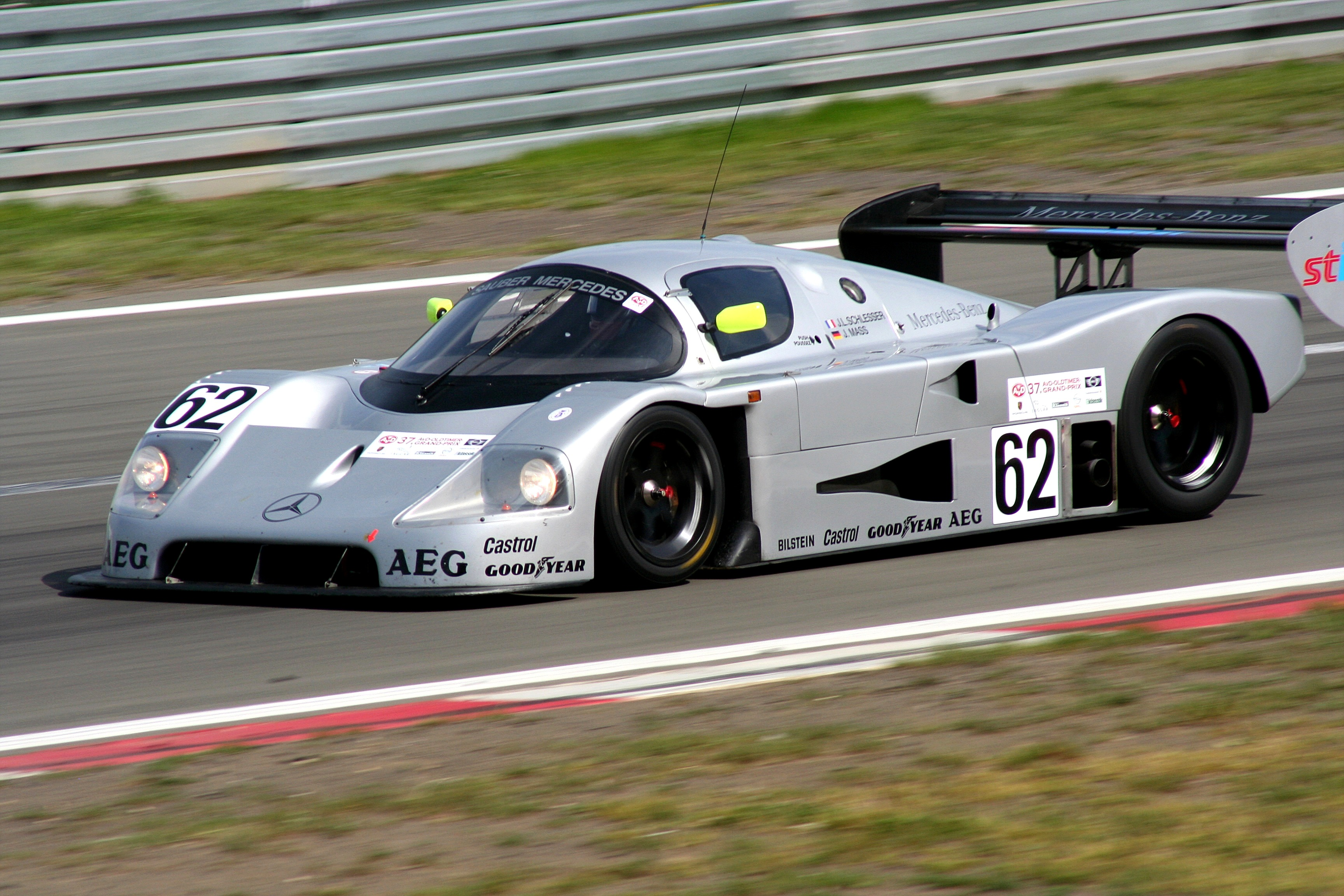 Sauber-Mercedes C9 (Baujahr 1988), früherer Wagen von Schlesser/Mass, beim Oldtimer-GP gefahren von Rob Sherrard und Park Wanpe